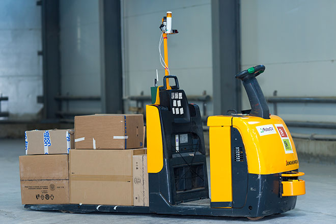 Робопогрузчик с автопилотом RoboCV